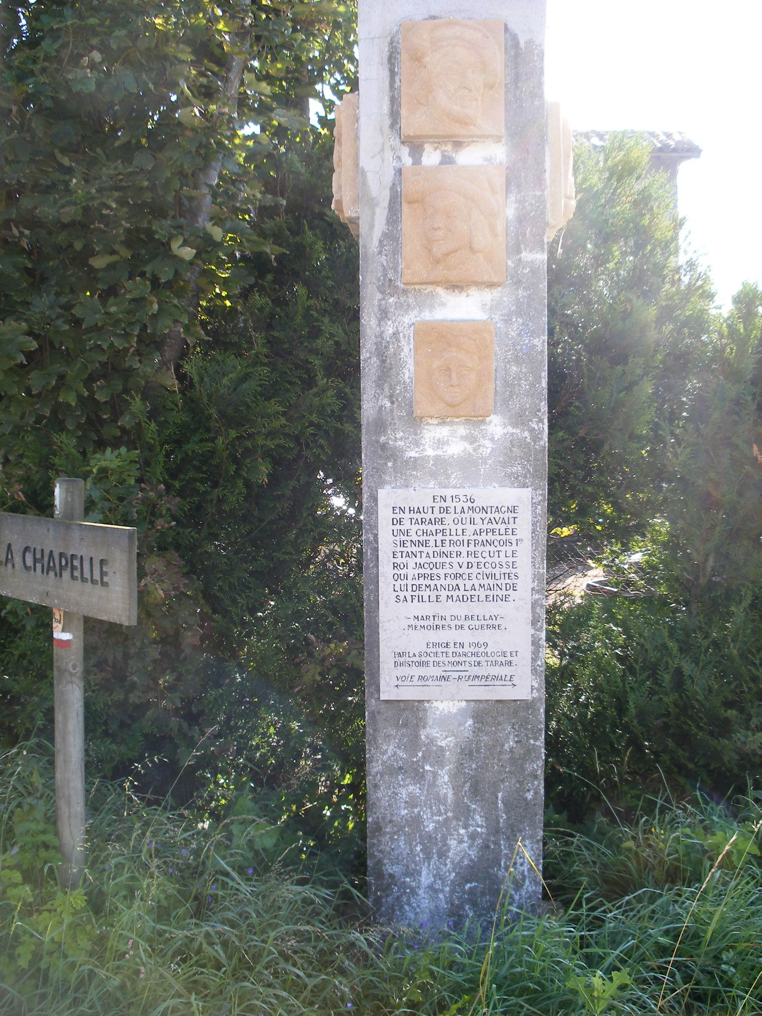 Monument de Madeleine de France